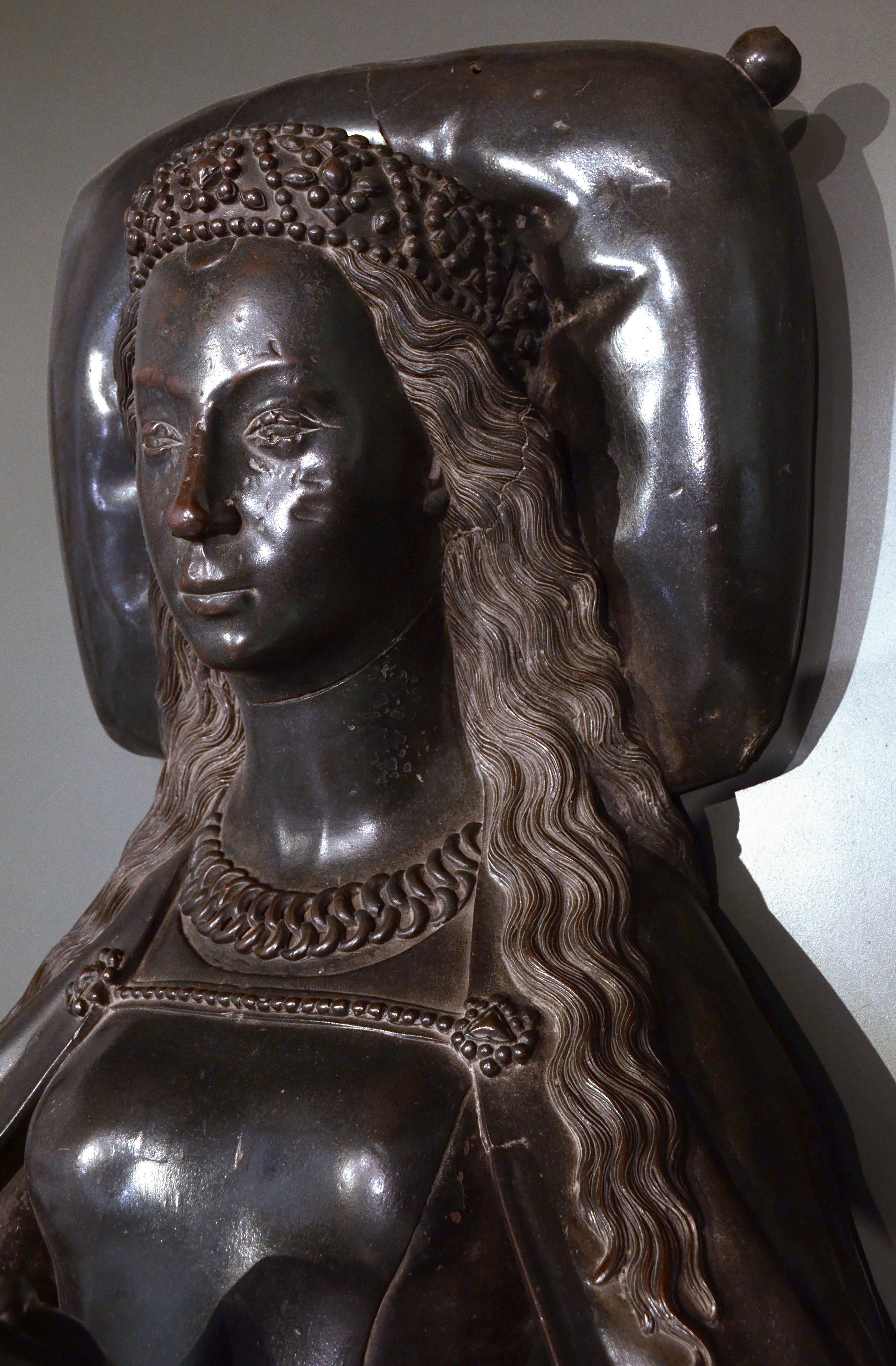 Gisant d'Isabelle de Bourbon (1436-1465), détail, en bronze, attribué à Jan Borman II et Reinier van Thienen. Situé à l'origine dans l'abbaye de Saint-Michel à Anvers, le monument a été endommagé en 1566 par les iconoclastes. Son visage a été inspiré par un tableau de Rogier van der Weyden. Musée M à Louvain. Photographie pivotée pour présenter une image verticale, comme un portrait.